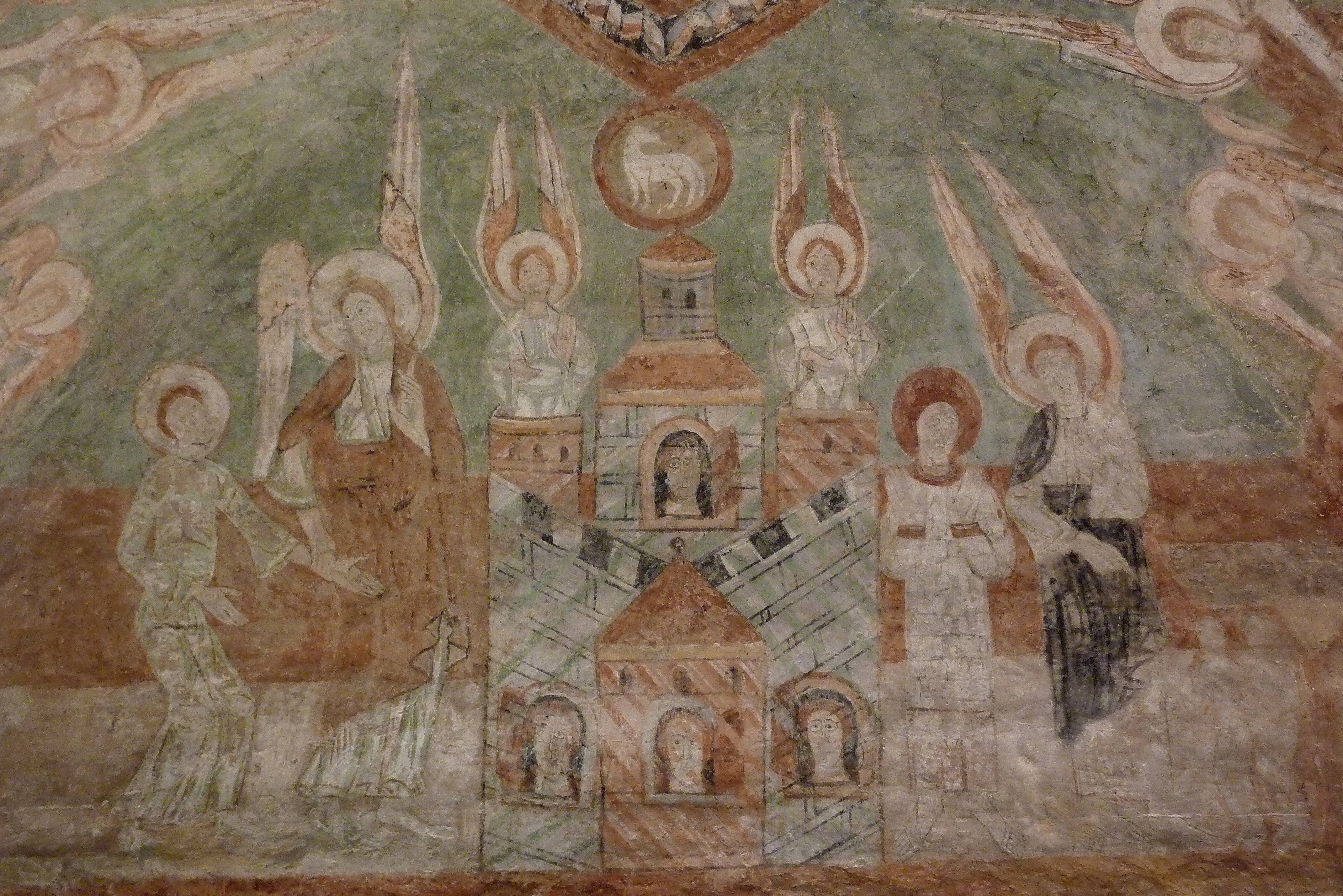 Ehemalige Abteikirche Saint-Theudère in Saint-Chef, einer Gemeinde im Département Isère in der französischen Region Rhône-Alpes, romanisches Fresko an der Decke der Chapelle des Anges, Darstellung: Himmlisches Jerusalem